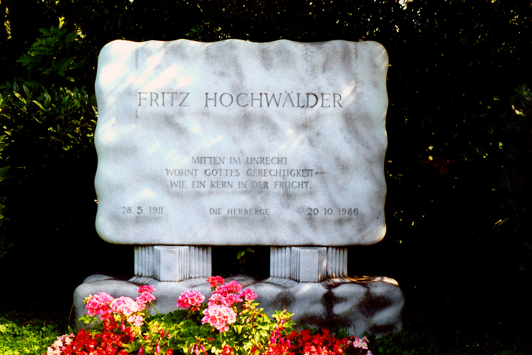 Fritz Hochwälder *28.5.1911 in Wien 7.,Westbahnstraße 3 + 20.10.1986 in Zürich. Ehrengrab am Wiener Zentralfriedhof 2.Tor,Gruppe 33, Grab Nr.7 Österreichischer Dramatiker, ab 1947 Mitglied des Österreichischen PEN-Clubs.